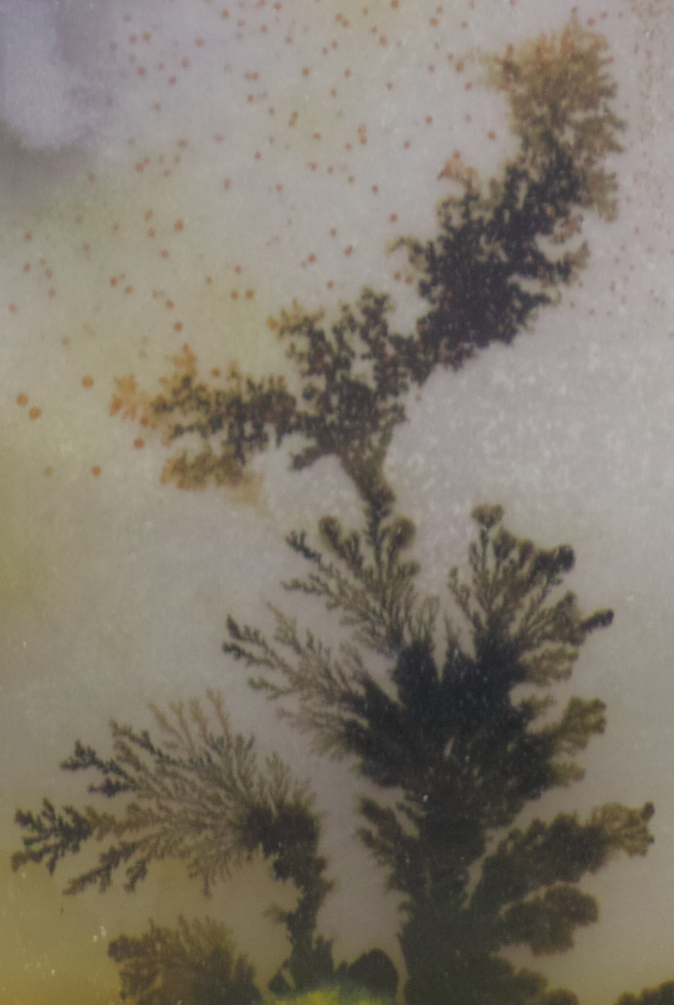 Dendritic Agate from Ken River, Bundelkhand Region, India